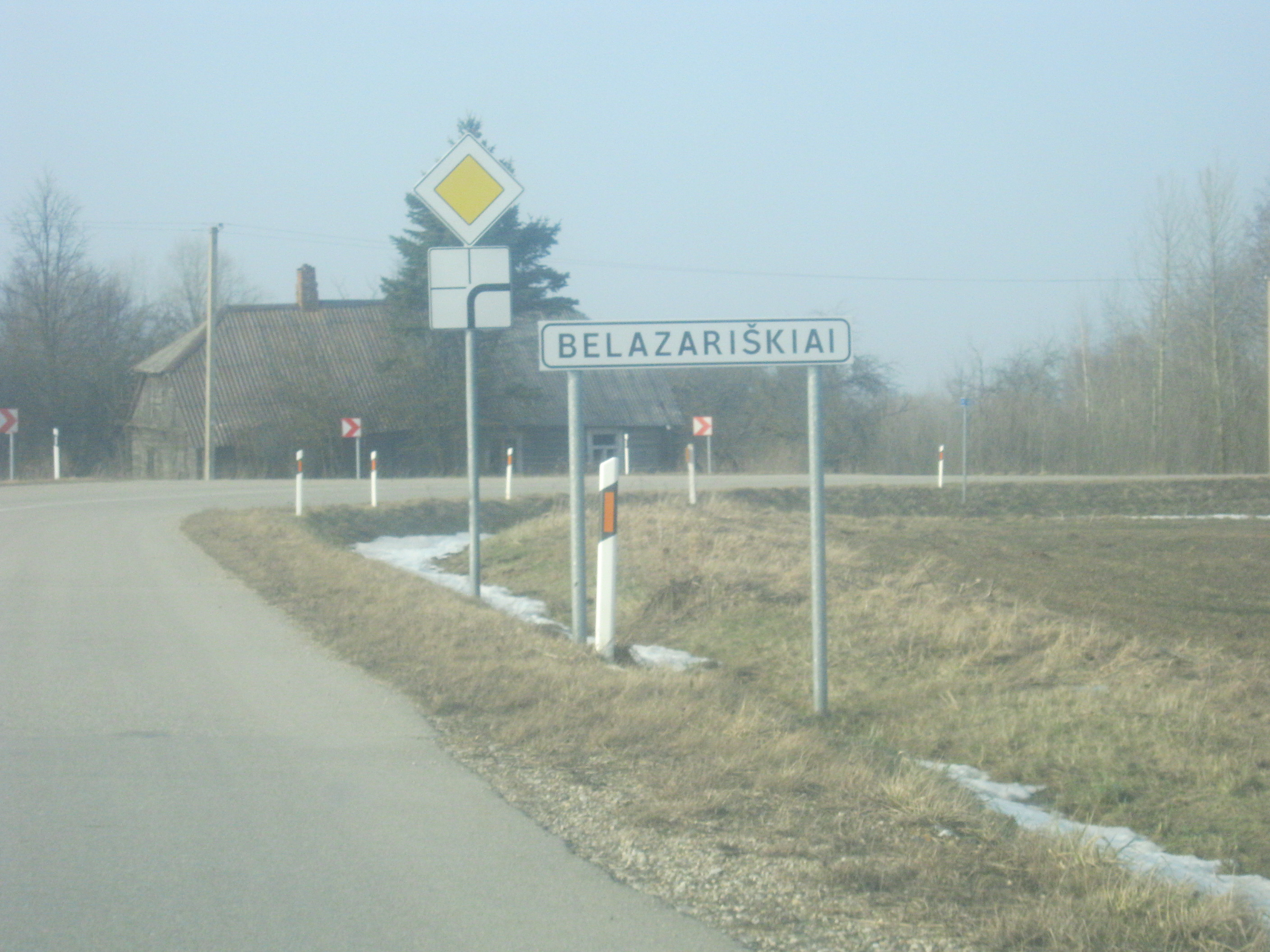 Ukmergės rajonas